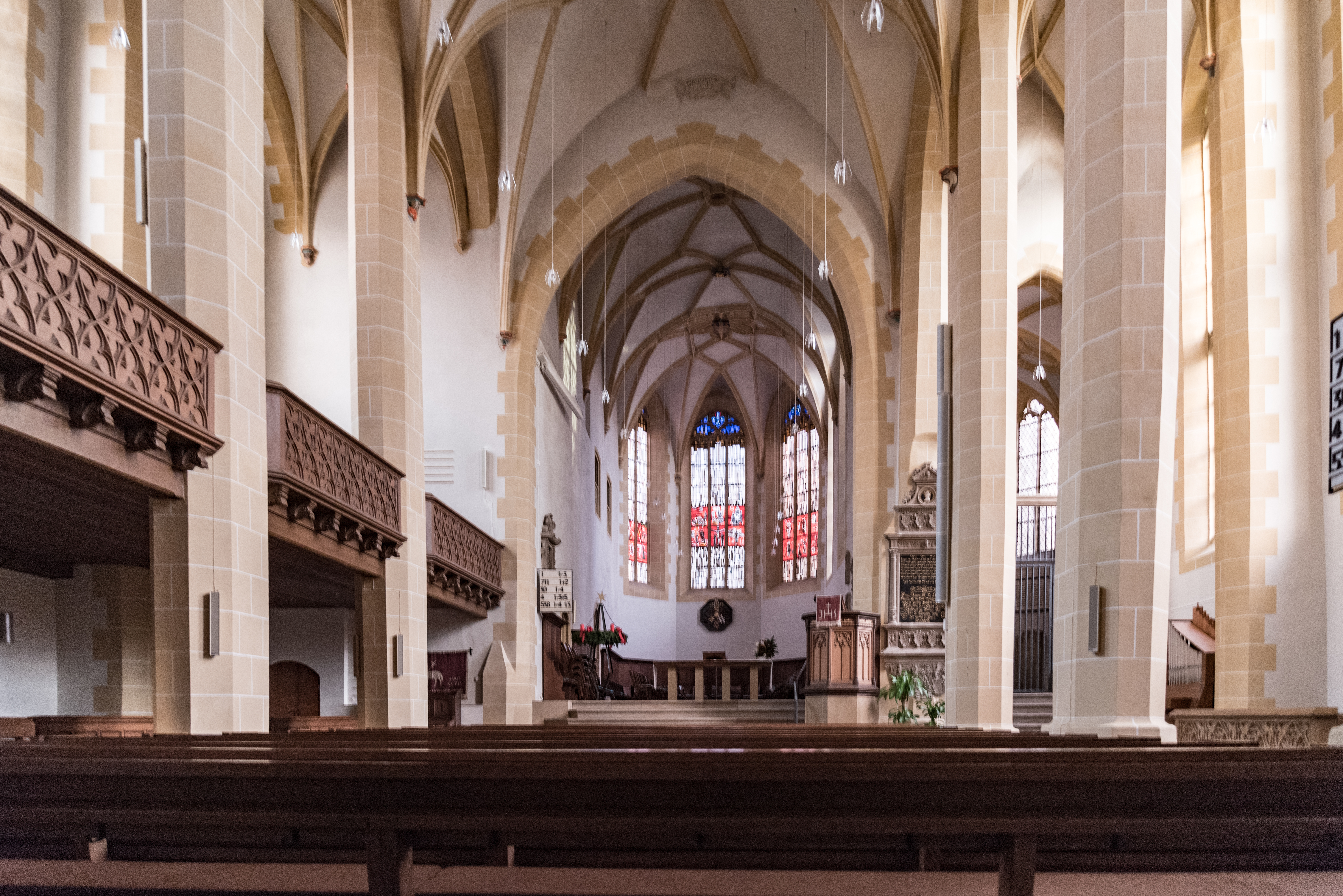 Simmern, Römerberg 2, Evangelische Kirche St. Stephan